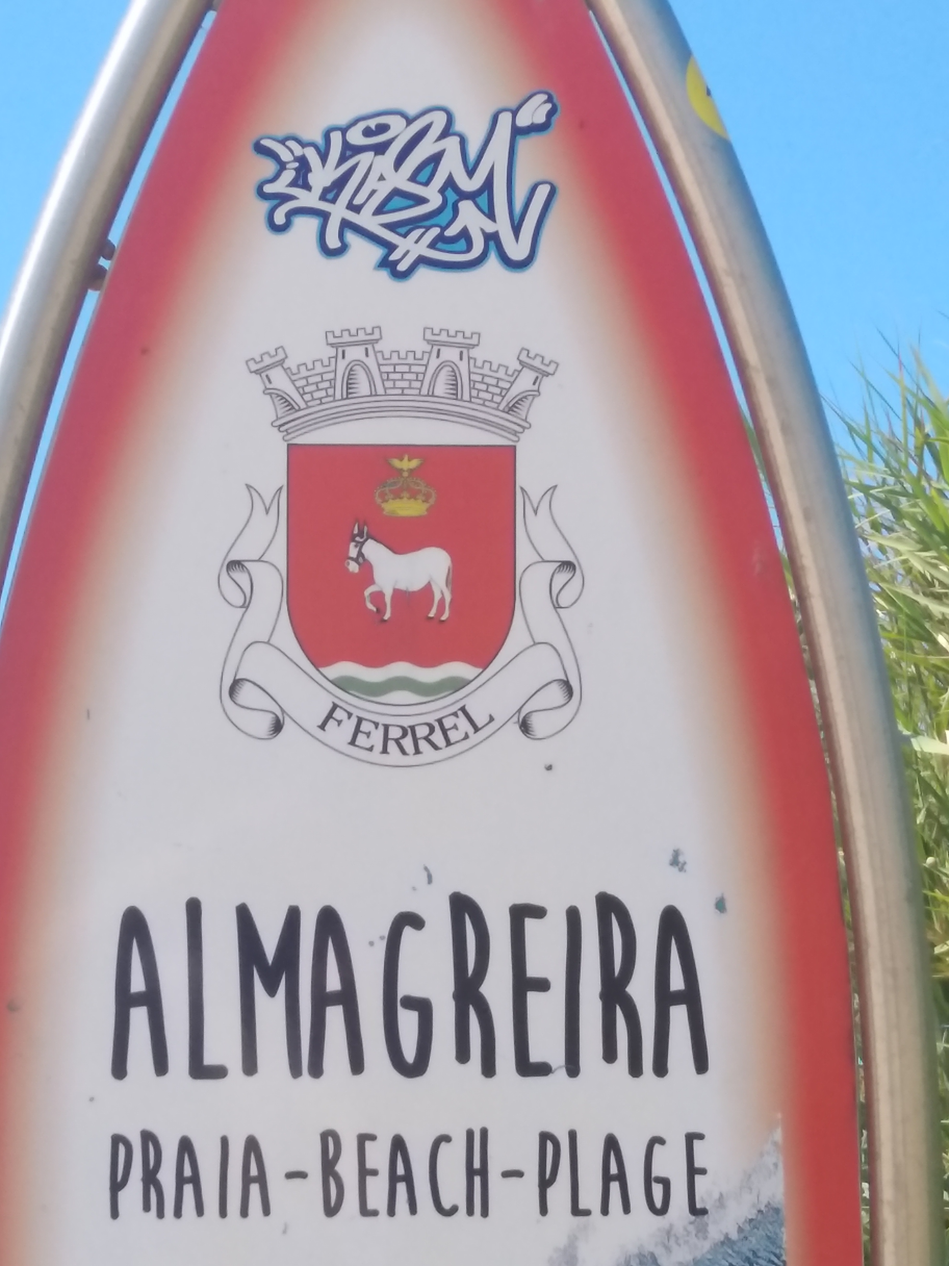 Prancha de Boas Vindas à Praia da Almagreia